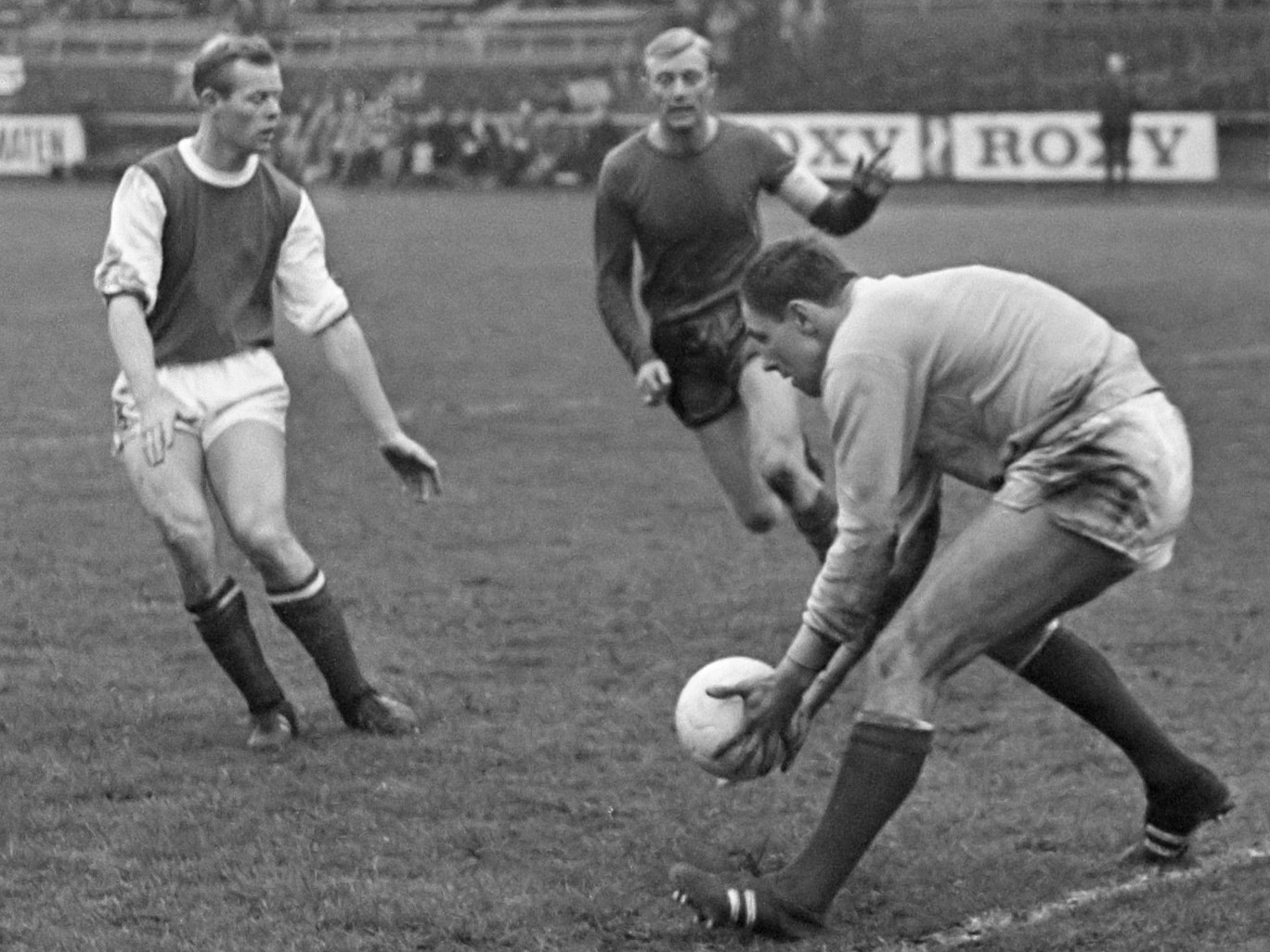 DWS tegen GVAV 1-1. Tonny van Leeuwen pakt de bal, voor hem Martin Koeman en Piet Kruiver (DWS) 19 november 1967